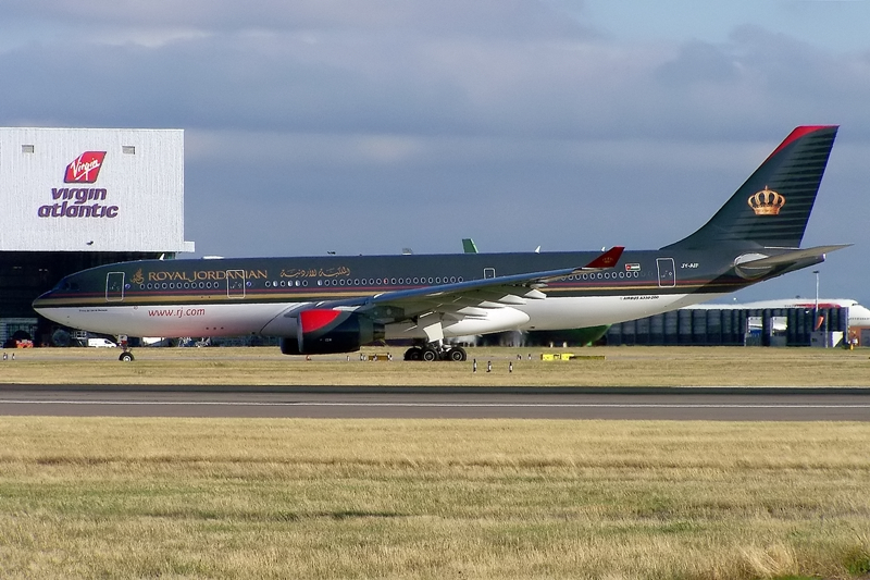 JY-AIF A330 Royal Jordanian